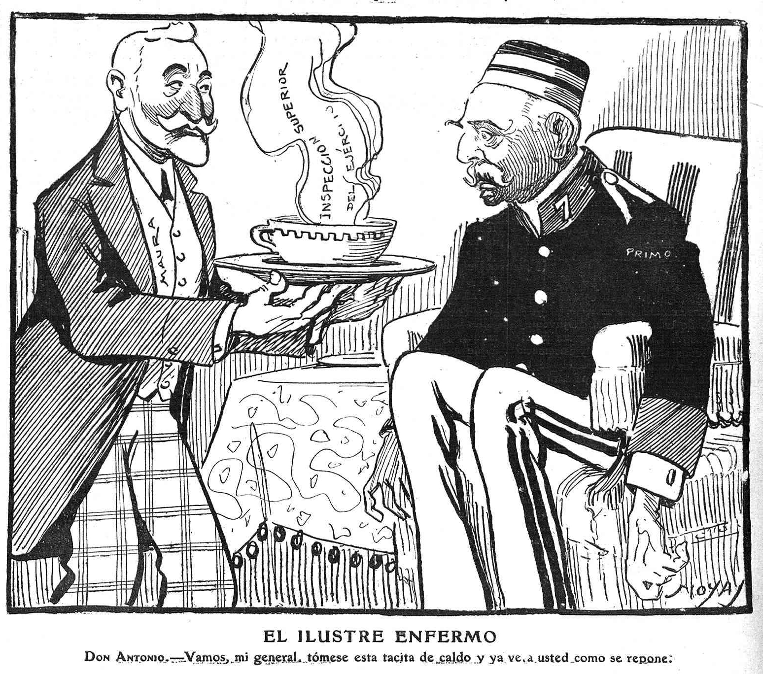 «El ilustre enfermo», en la revista satírica española Gedeón.